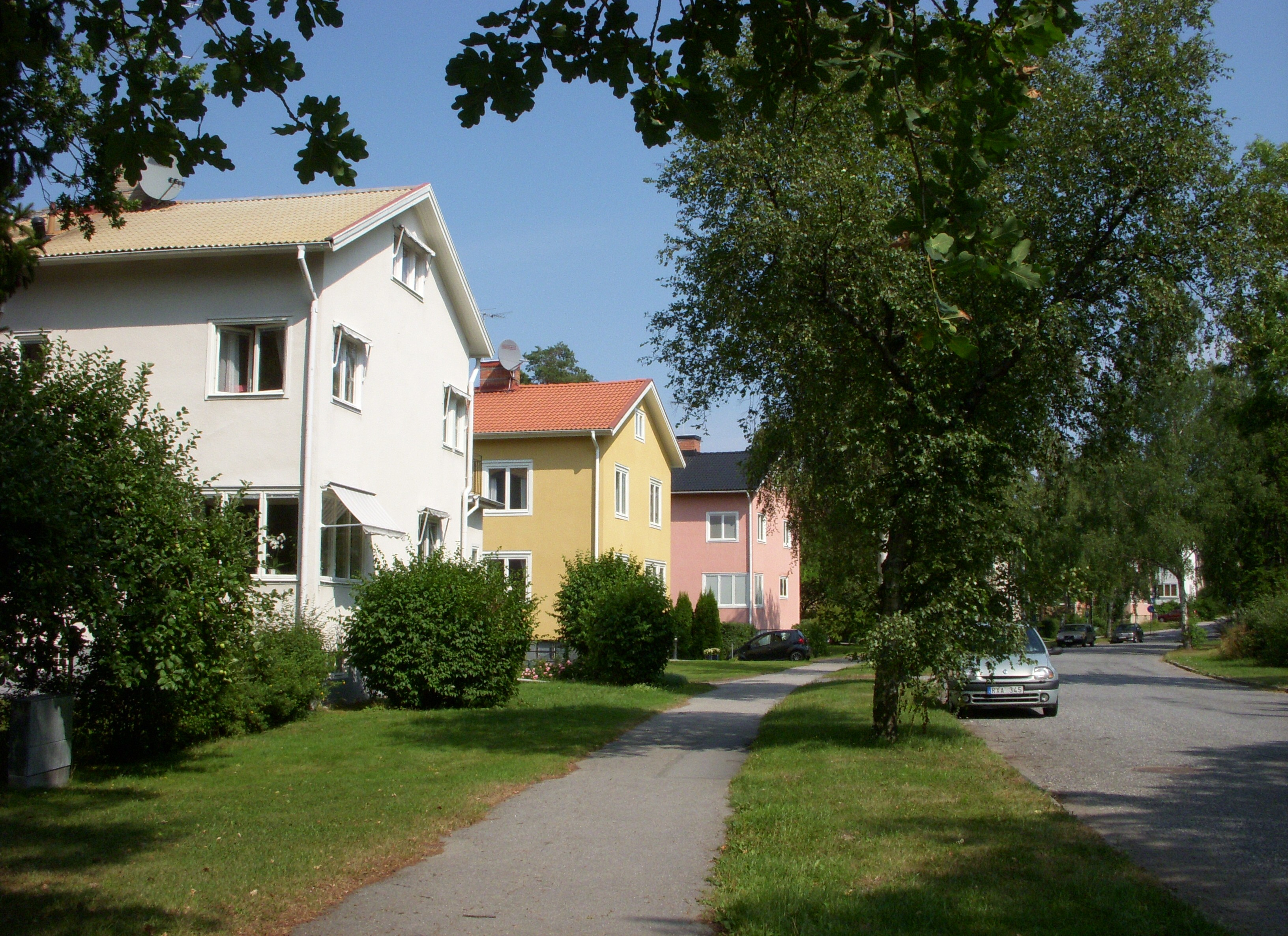 Nockeby, Stockholm, bebyggelsen längs Nockeby kyrkväg